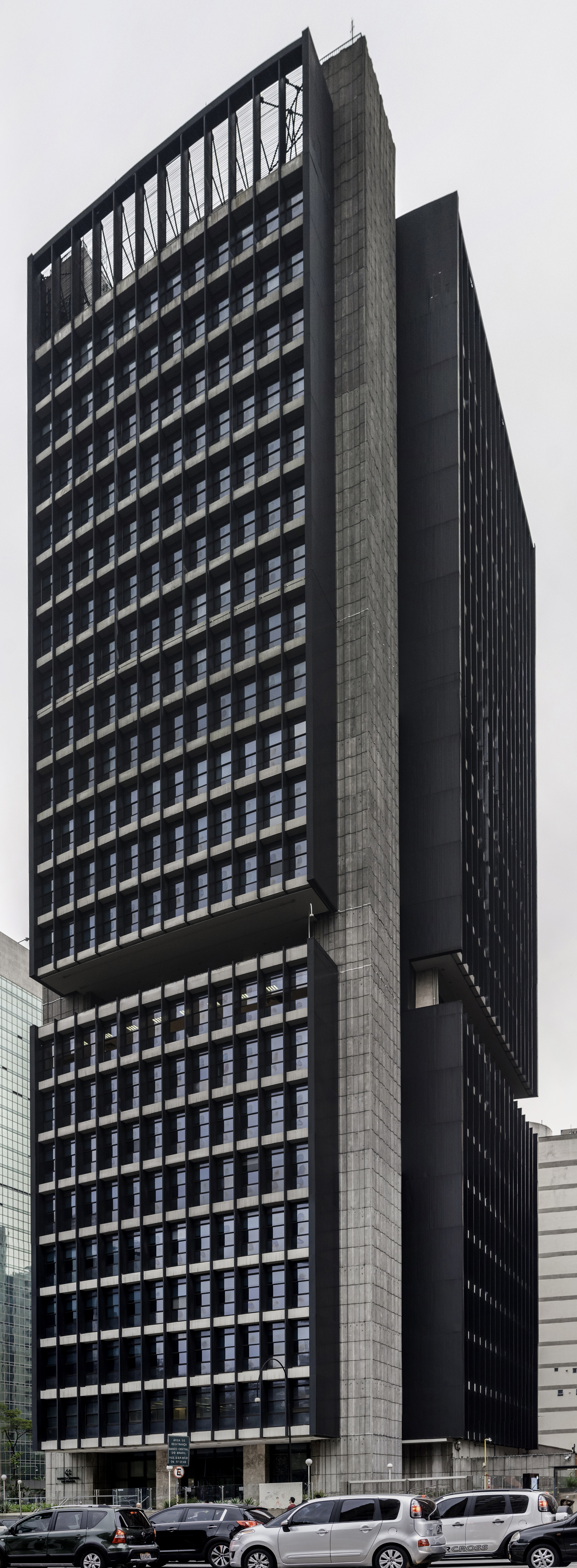 Edificio Sede del Banco Central de Brasil en São Paulo